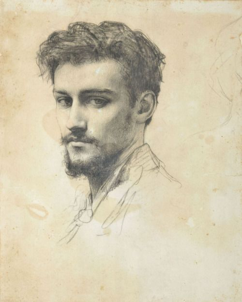 Portrait de Paul Victor Grandhomme